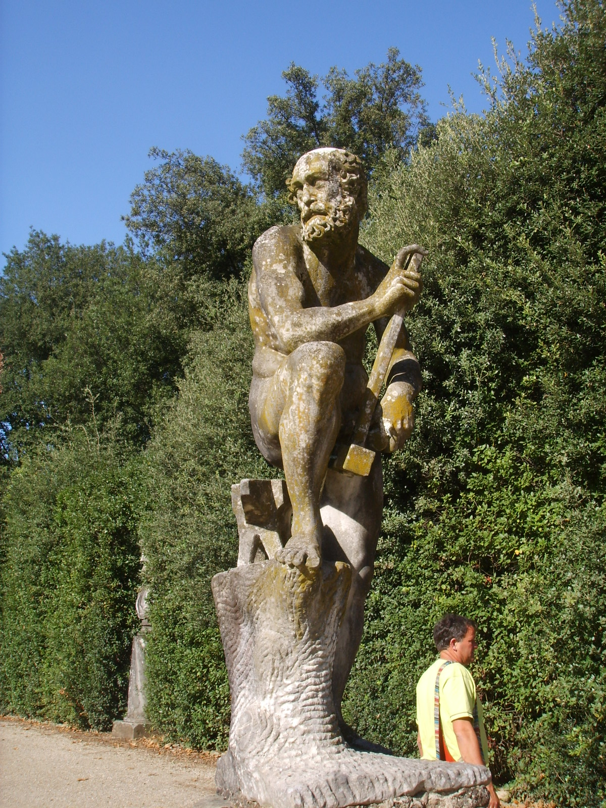 Boboli, emiciclo statua di vulcano